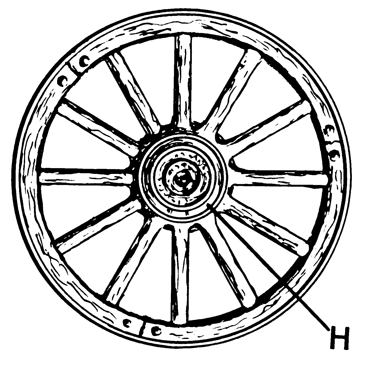 Hub